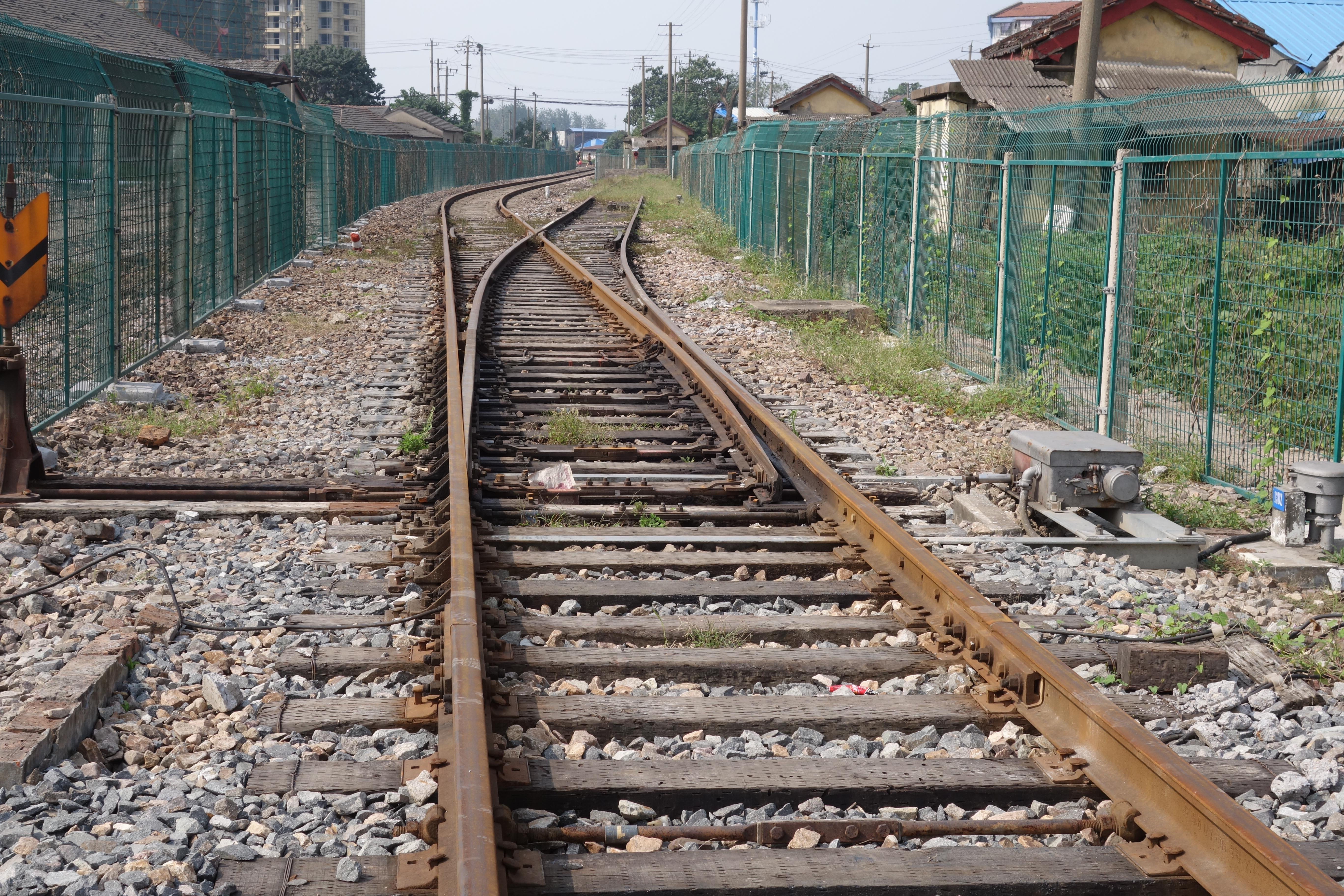 铁路白沙支线